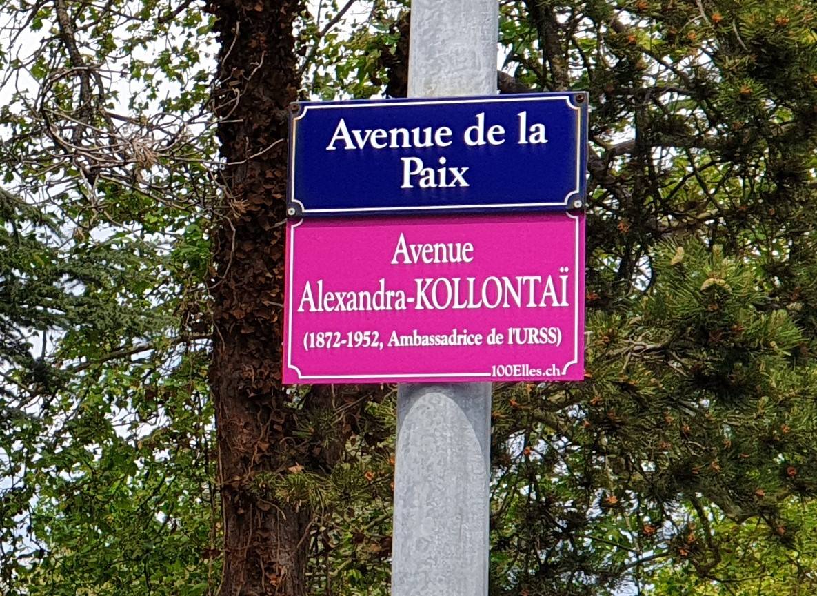 Plaque temporaire de rue apposée dans le cadre du projet 100elles à Genève en 2019